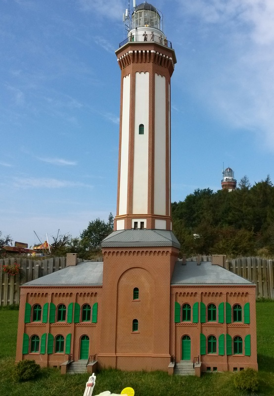 Park Miniatur Latarni Morskich w Niechorzu